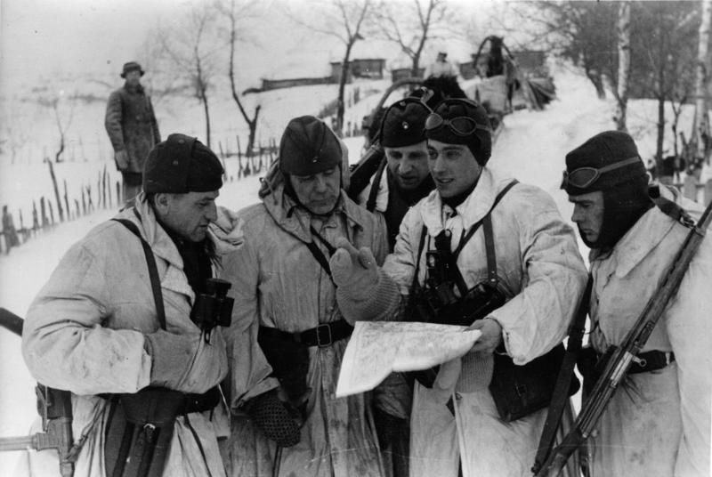 Lettland, Freijäger im Einsatz gegen Partisanen Scherl Bilderdienst Gegen bolschewistische Banden im Osten sind auch landeseigene Freijäger eingesetzt worden. Unser Bild zeigt den Stab eines lettischen Jagdkommandos, das im rückwärtigen Gebiet Polizeidienste ausübt. PK Aufnahme, Kriegsberichter van der Piepen, 19.3.43 [Herausgabedatum] 1444-43